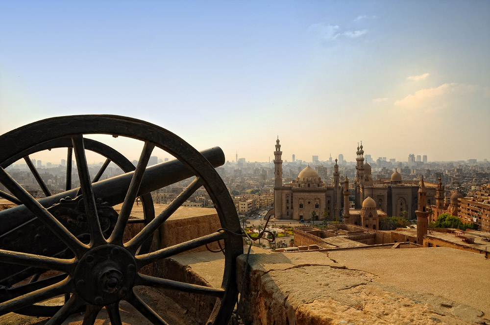 صوره عامه لميدان صلاح الدين ويظهر مدفع القلعه ينظر الى مسجد السلطان حسن ومسجد الرفاعى